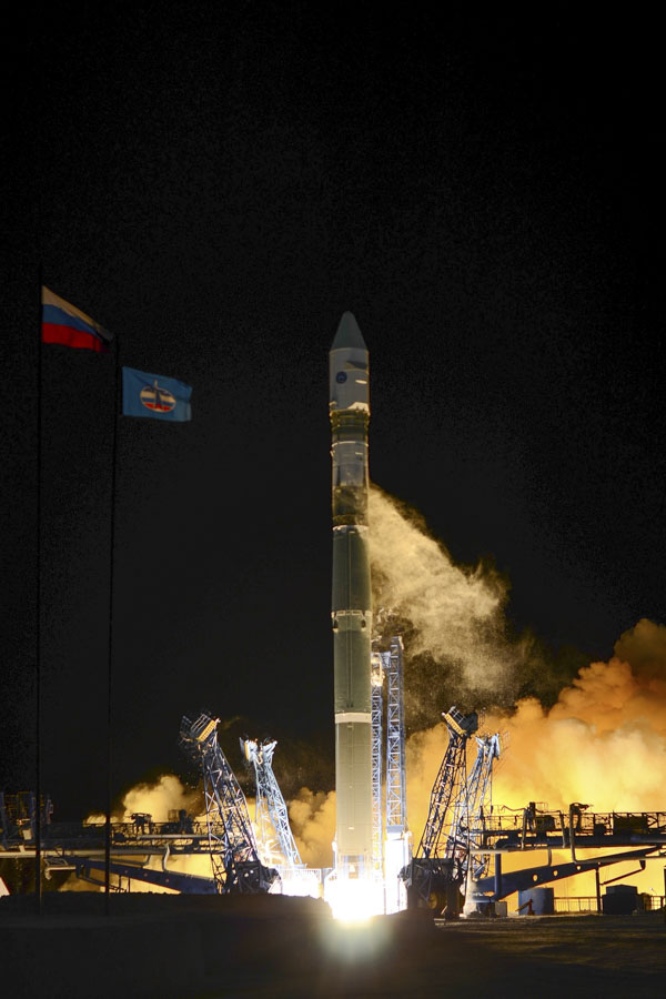 Воздушно-космические силы провели успешный пуск ракеты-носителя «Союз-2» с космодрома Плесецк